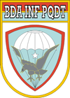 Brasão da Brigada de Infantaria Pára-quedista do Exército Brasileiro